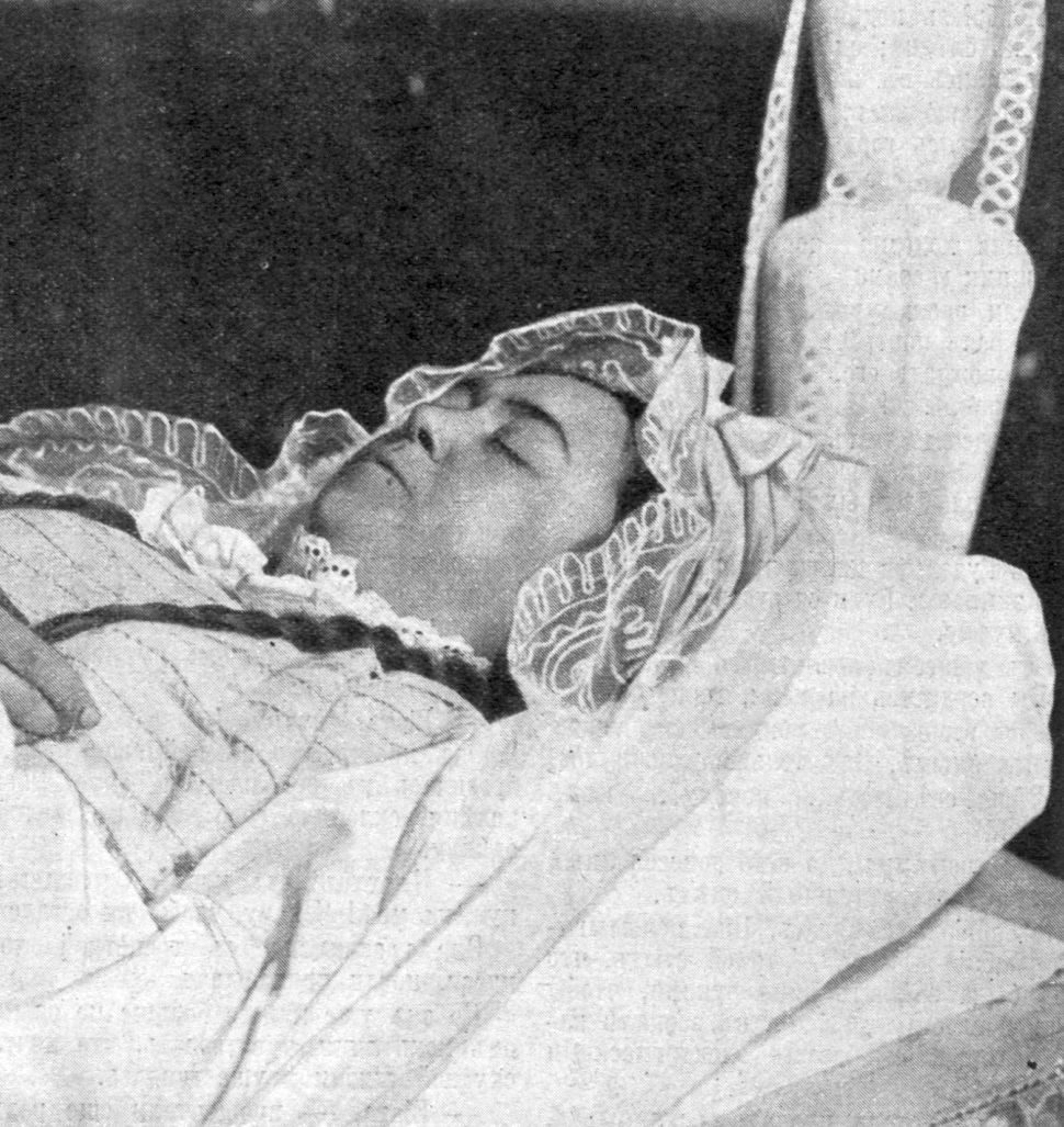 О.Н. Чумина-Михайлова на смертном одре